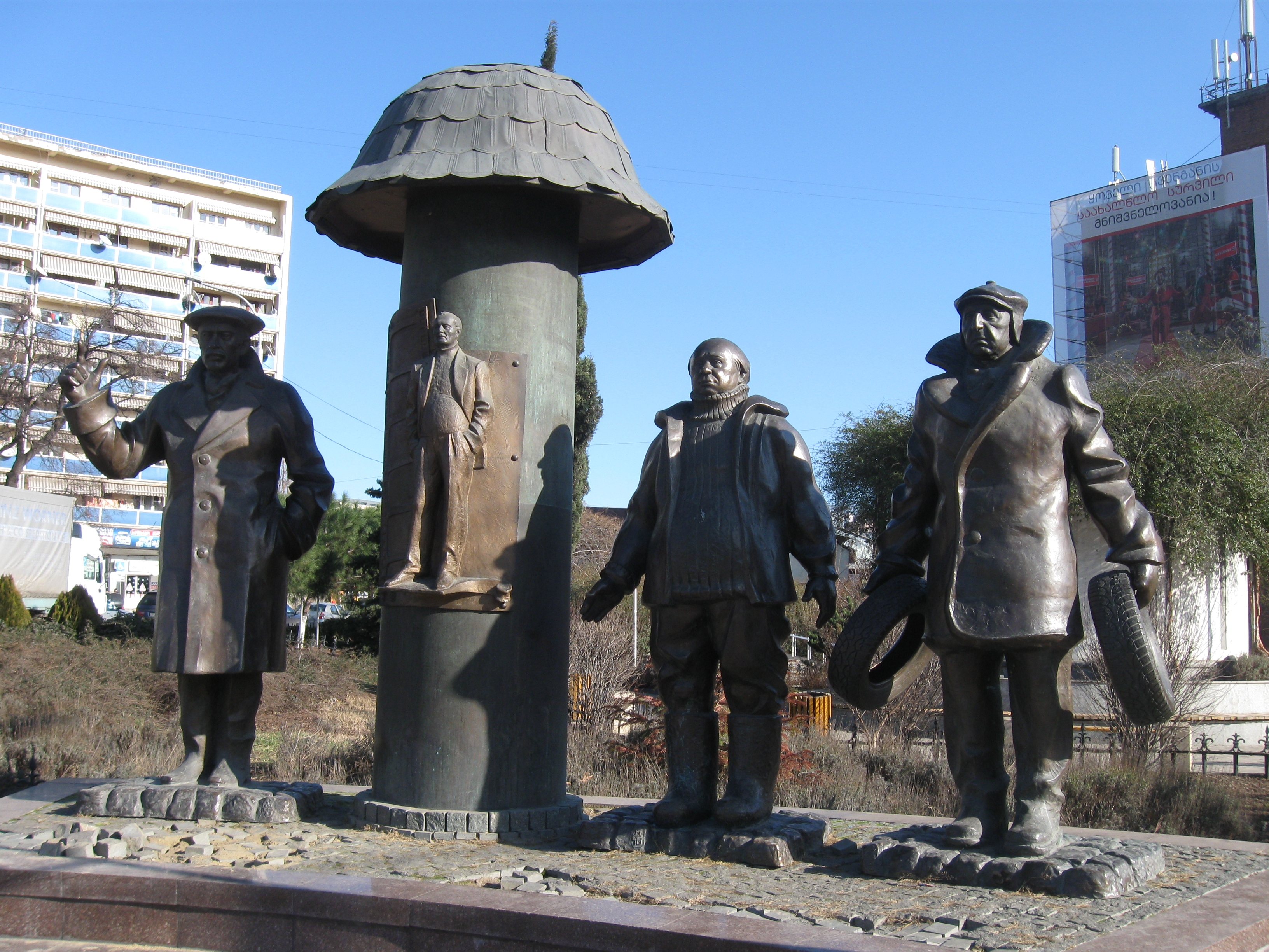 Միմինո արձանախումբը